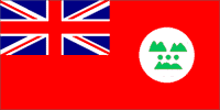 Summary Drapeau de la principauté de Junâgadh Source Shiva-Nataraja Statut Gérald Anfossi Catégorie:Drapeau de principauté des Indes